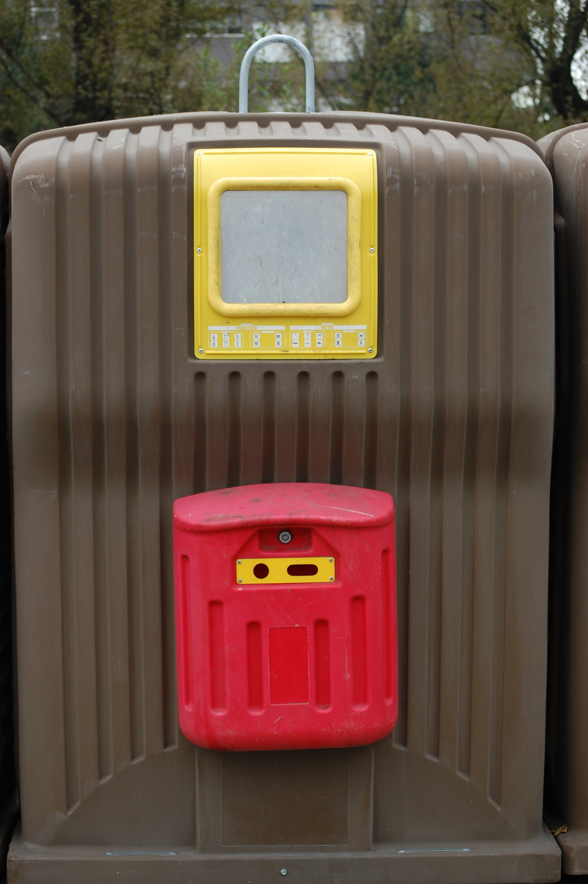 Contentor para reciclagem de metal e plástico, com um mini-contentor acoplado para reciclagem de pilhas e baterias, situado no Parque das Quintãs, Guimarães.